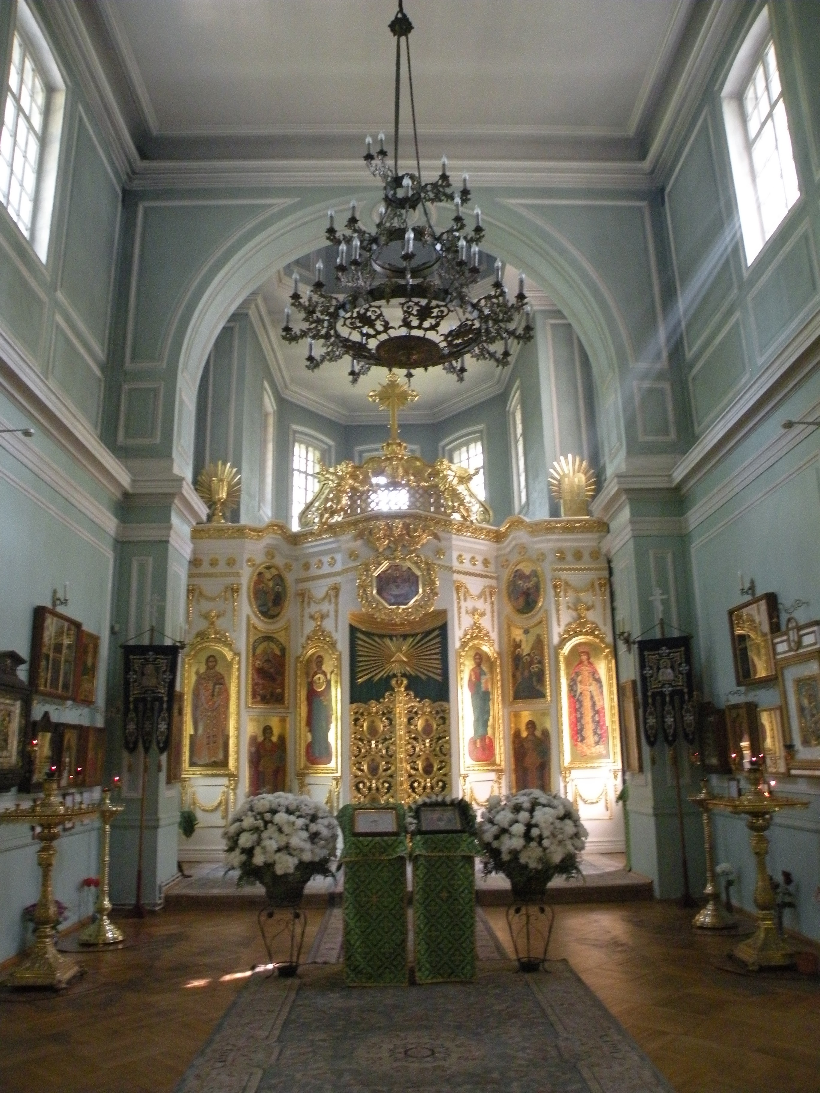 Znamenskaya Church in Tsarskoe Selo